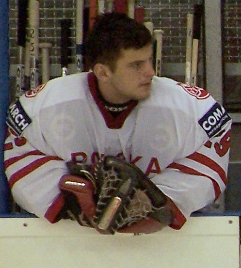 Rafał Radziszewski podczas meczu reprezentacji Polski z Węgrami, Arena Sanok 12.04.2006